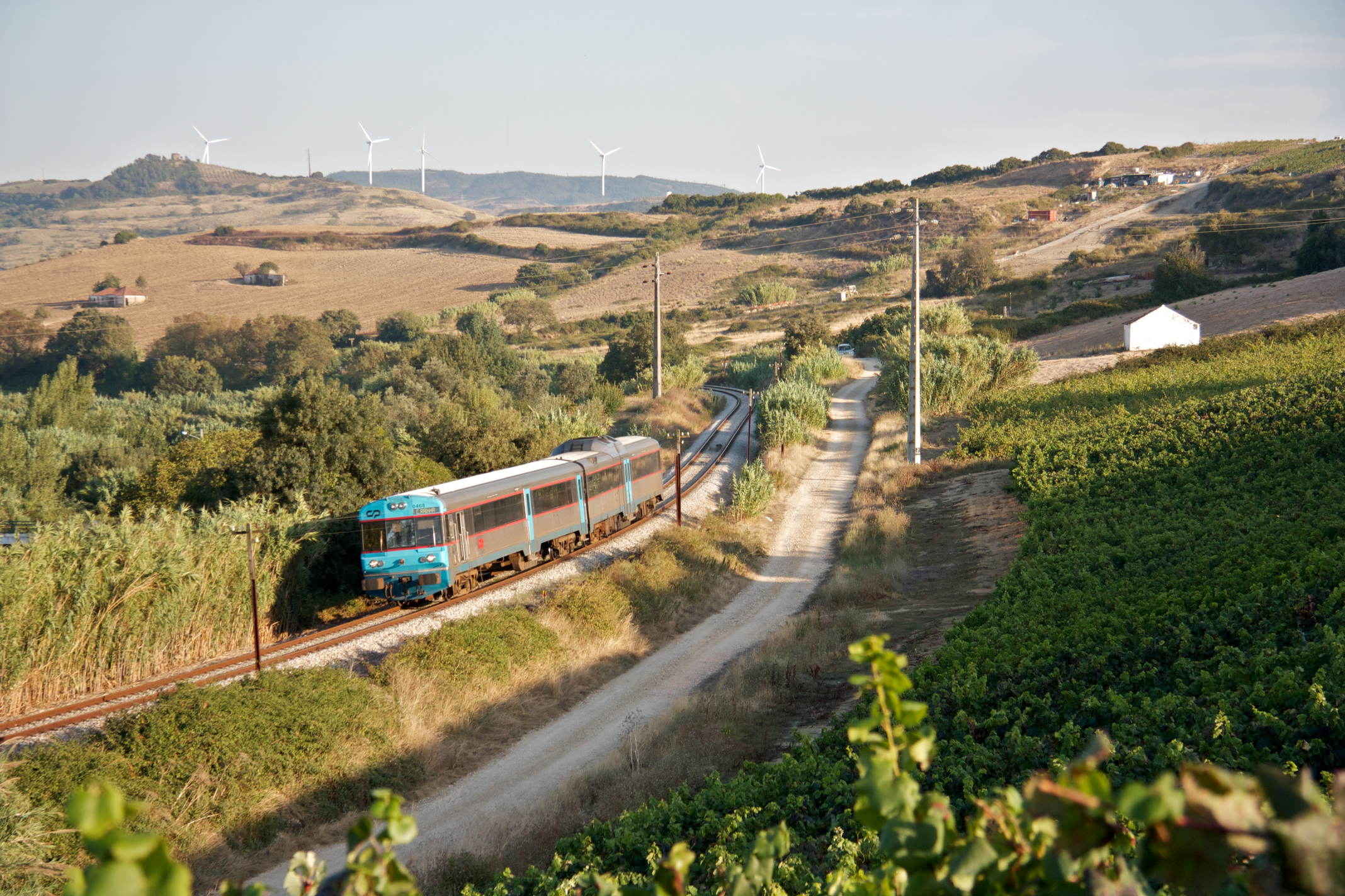 Tipo: Comboio Regional 6419 [Mira Sintra • Meleças - Caldas da Rainha] Local: Dois Portos [Linha do Oeste, PK 54] Data e hora: 10 de Agosto de 2011 [19h13] Material: Automotora 0468 [Unidade Dupla Diesel]